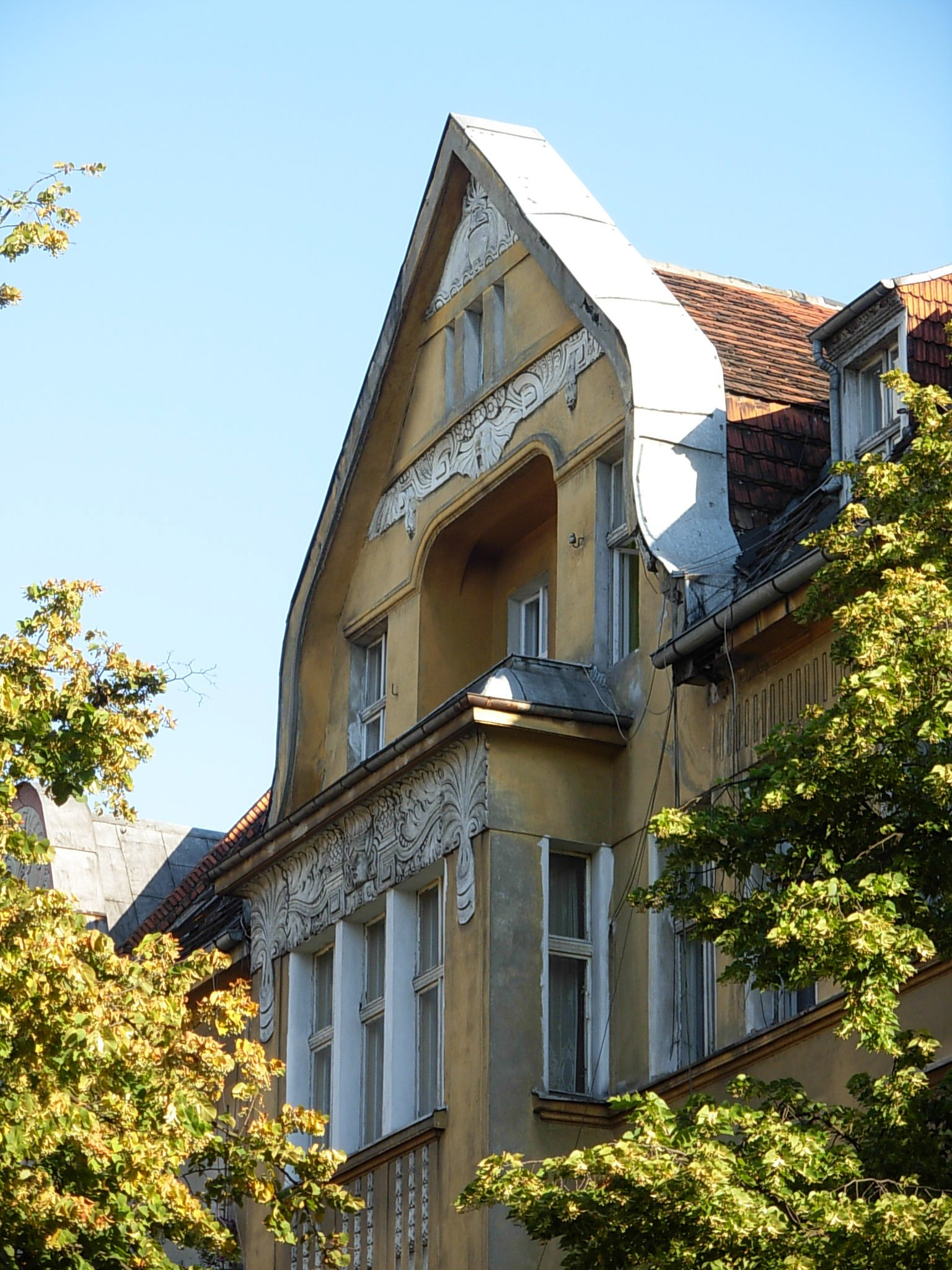 Szczyt kamienicy przy ul. 20 Stycznia 1920 w Bydgoszczy